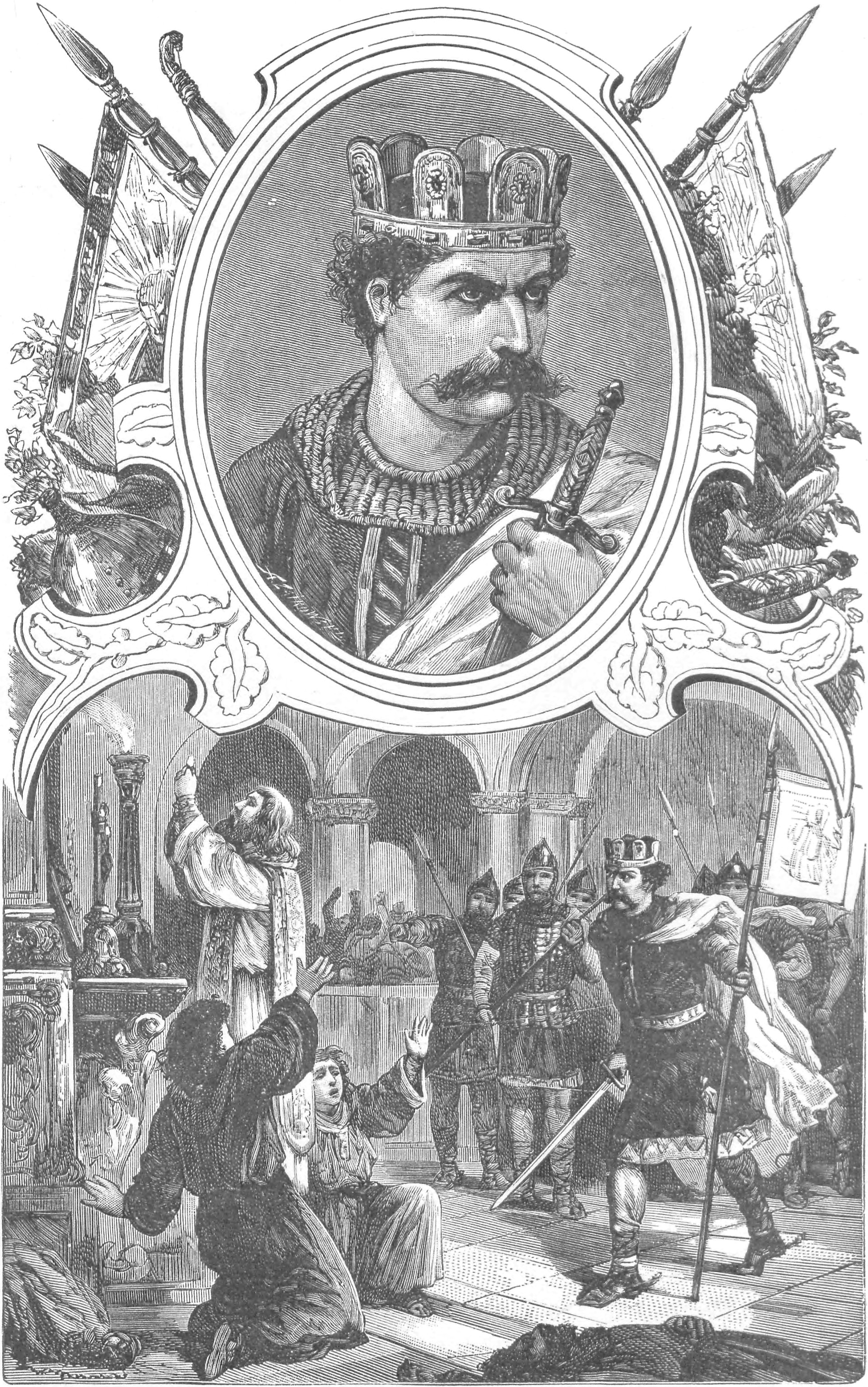 ilustracja z książki „Wizerunki książąt i królów polskich“